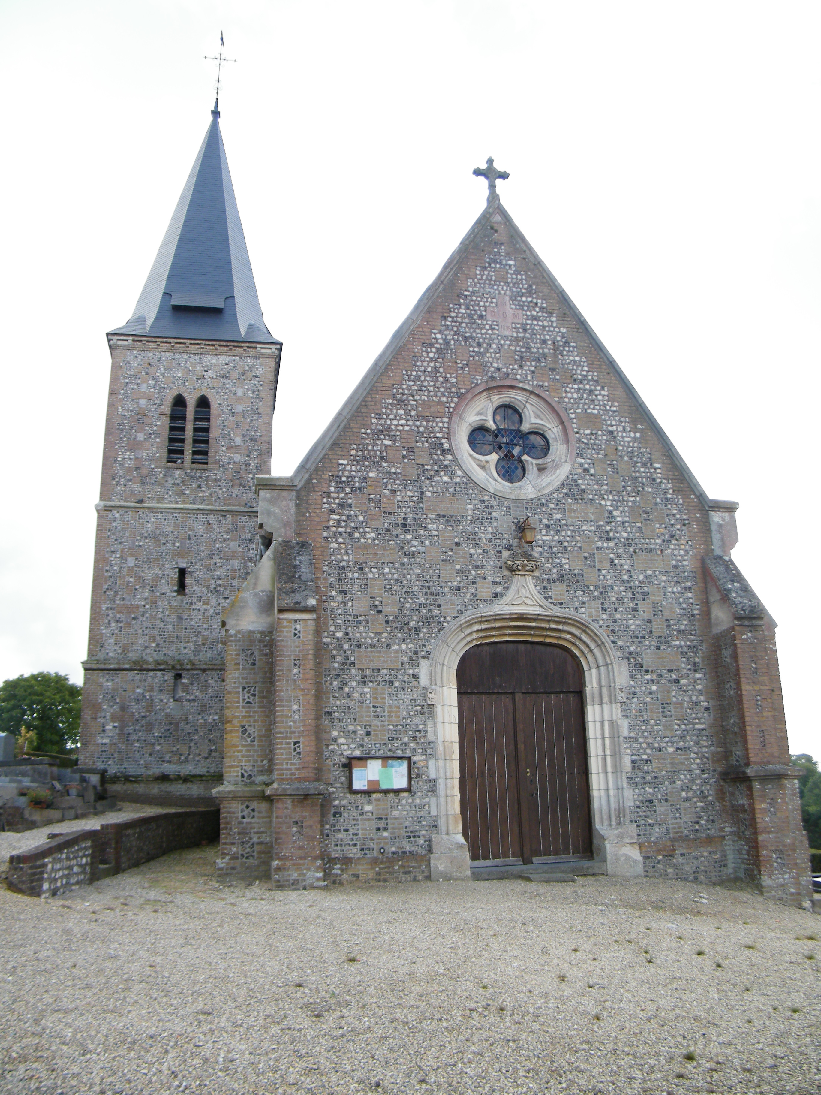 Bracquemont, Seine-Maritime, France, église